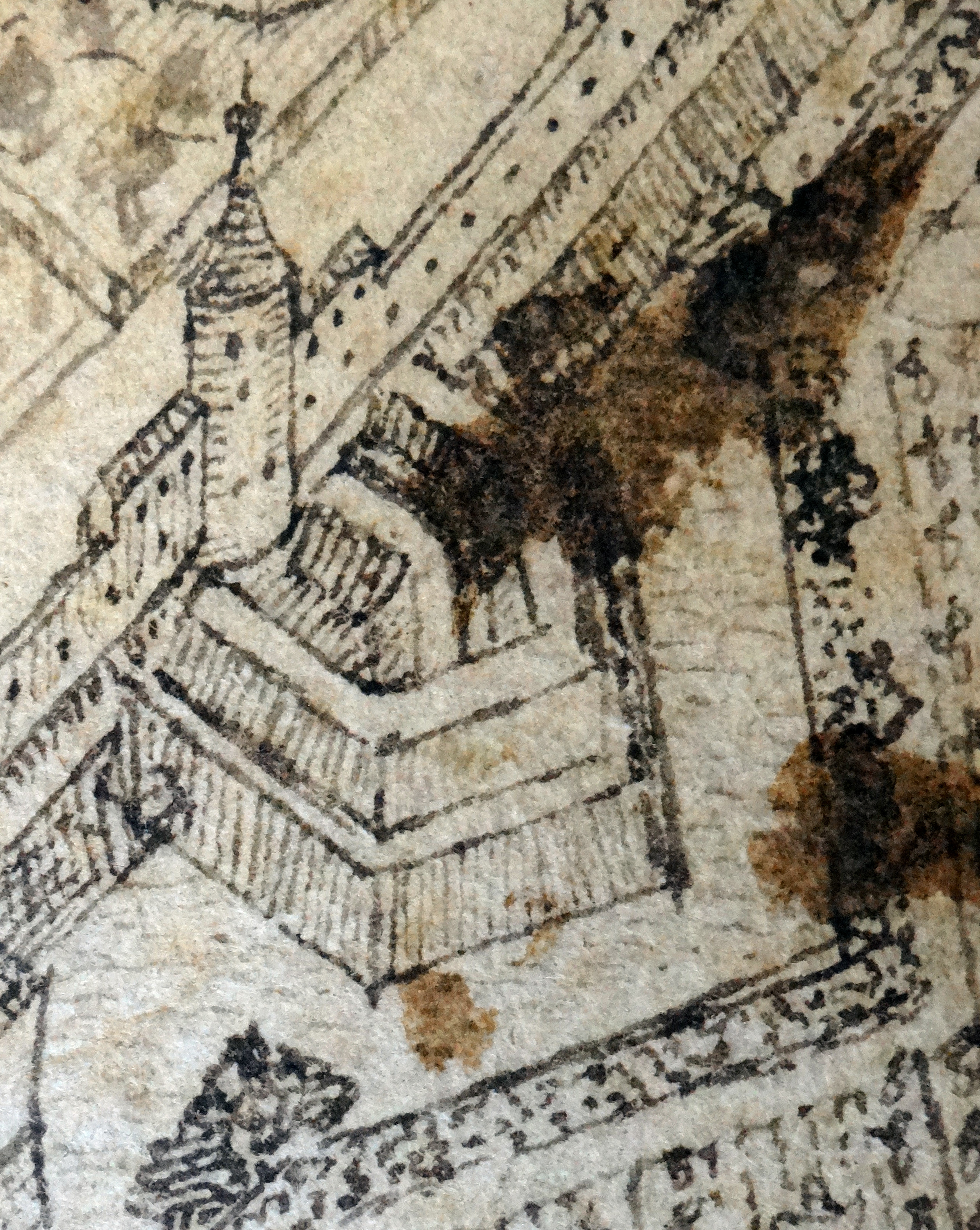 Abschnitt der äußeren Stadtmauer von Worms zwischen Mainzer Tor und Neuturm, erster Rundturm östlich des Mainzer Tores. Detail aus: Peter Hamman: Statt Wormbß wie selbige 1631 vor dem Schwedischen Ruin der Vorstätt [...] verblieben. Stadtarchiv Worms, Abt. 1B, Nr. 48.